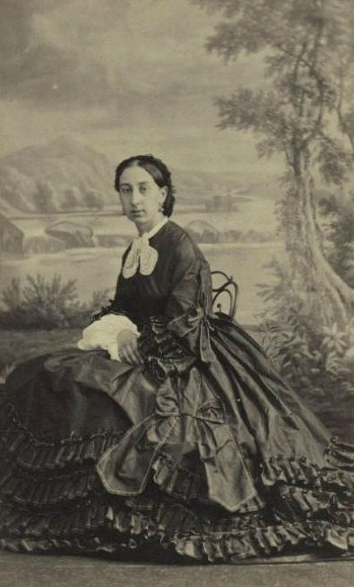 Наталья Афанасьевна Шереметева, ур. Столыпина (1834—1905)